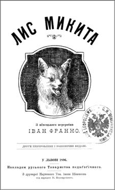 Титульный лист второго издания сказки Ивана Франко "Лис Никита" (1896)